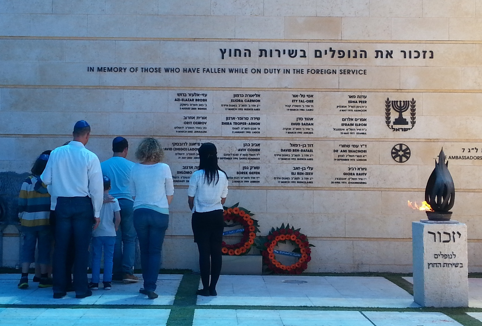 טקס הזיכרון לנופלים בשירות החוץ, מול קיר הזיכרון במשרד החוץ, ירושלים ערב יום הזיכרון תשע"ה - 21 באפריל 2015